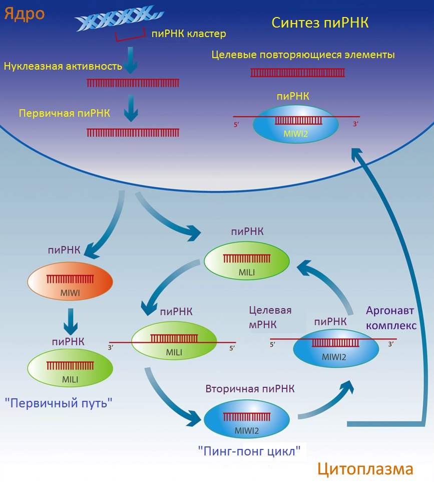 ПиРНК-индуцированное подавление транспозонов